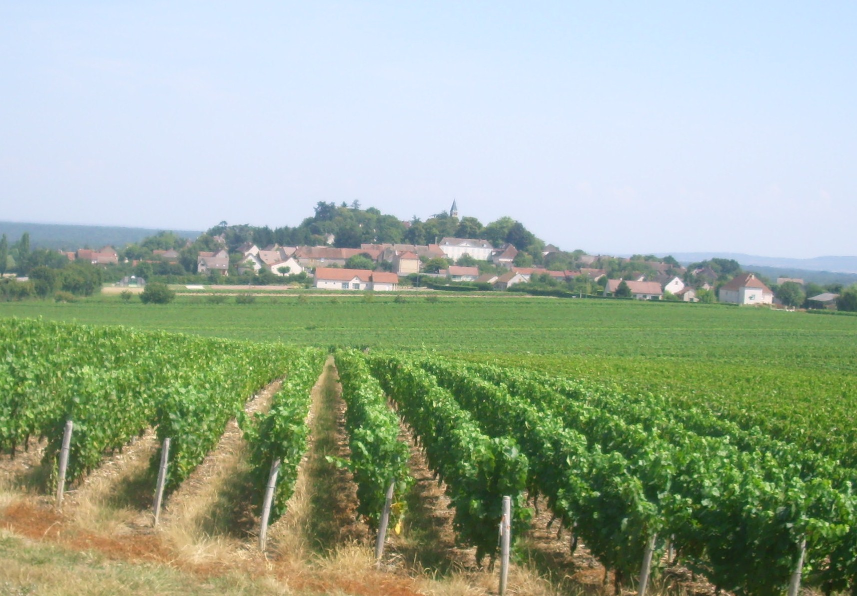 Vue du village de Jully-lès-Buxy (71)